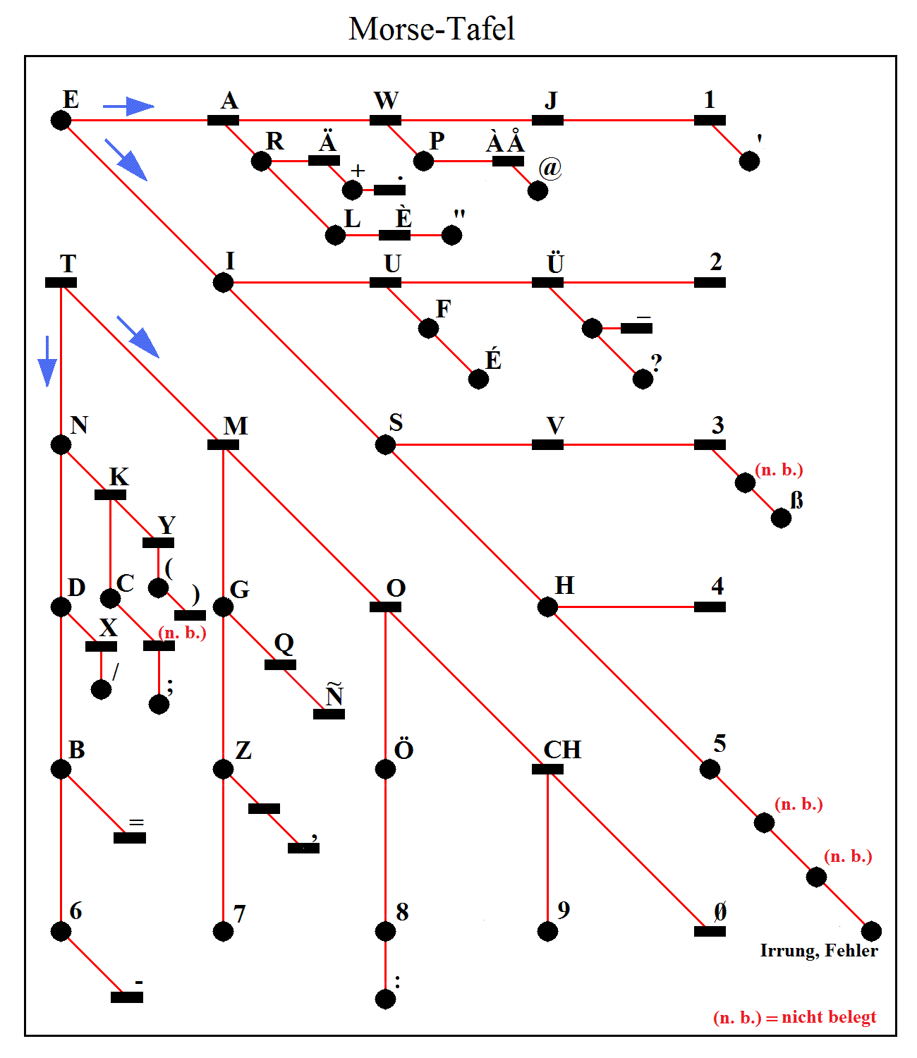 Tafel zum Dekodieren von Morsezeichen